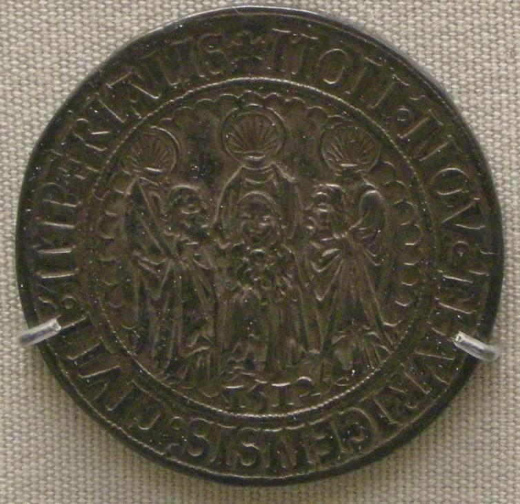 Zurigo, guldiner d'argento del 1512